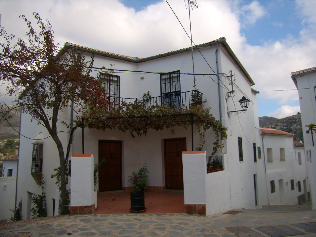 Casa particular en el municipio de Parauta, Málaga, España.